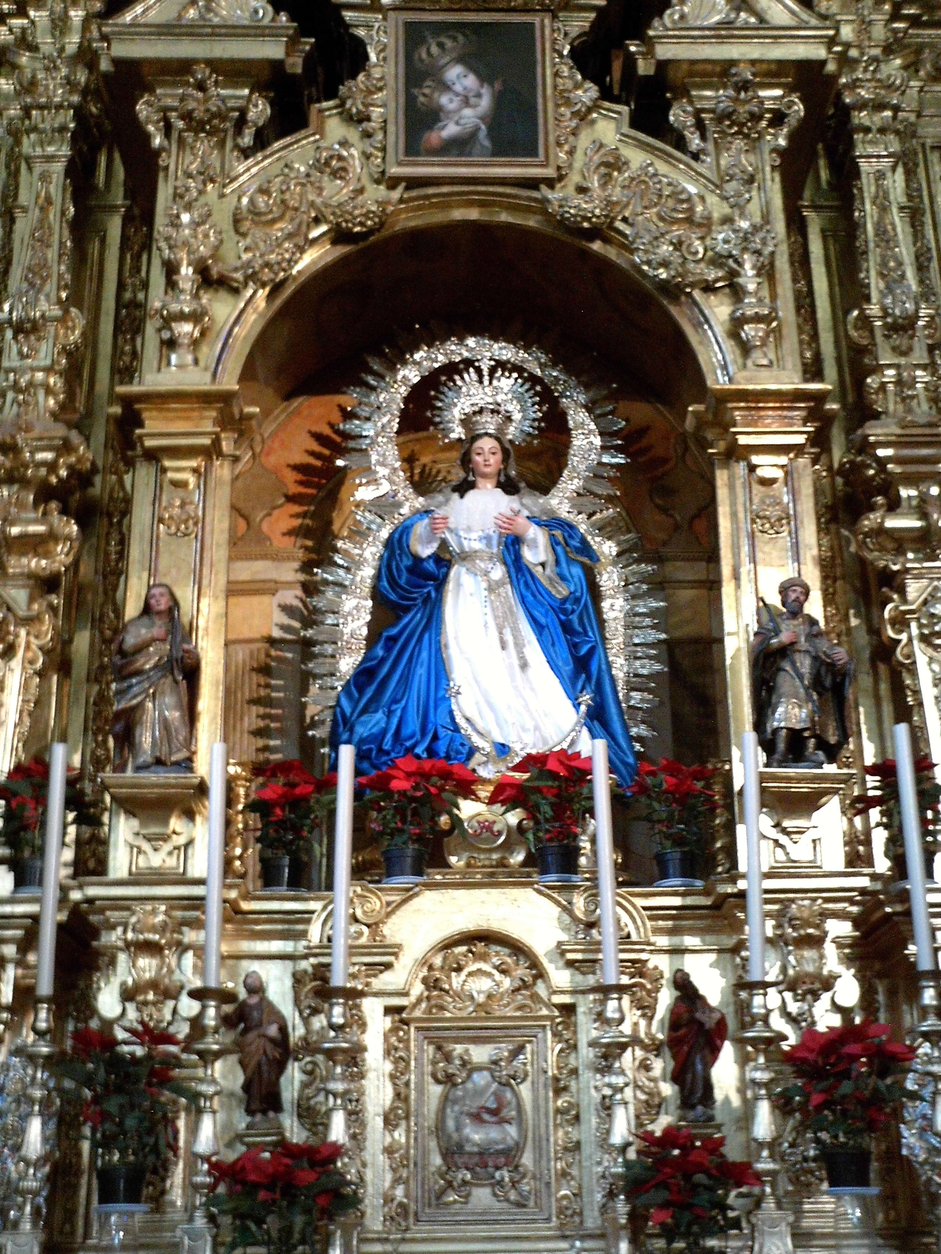 Virgen de Gracia. Iglesia de Santa María de Gracia. Gelves. Sevilla, Andalucía, España.